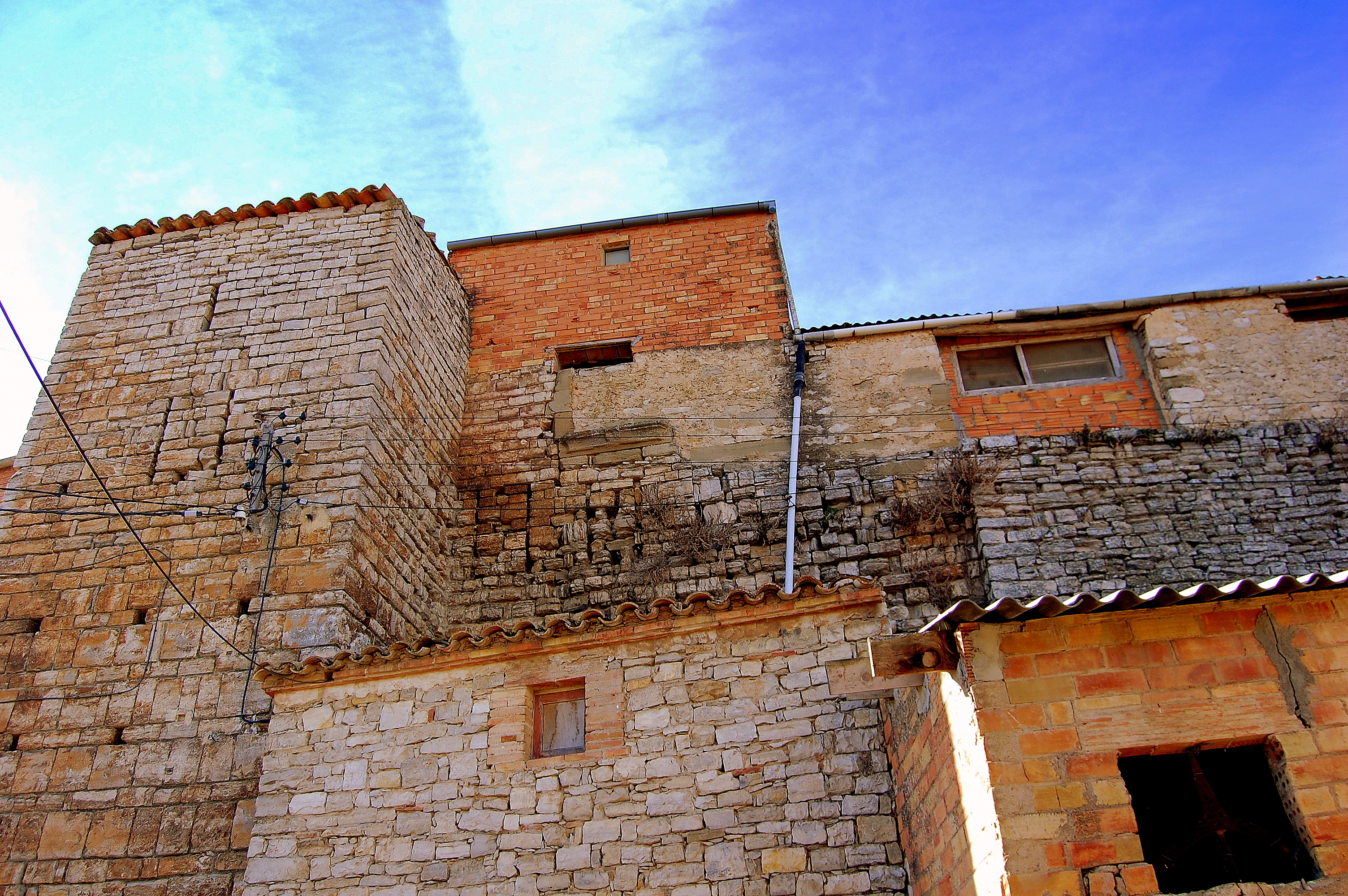 Castell de Castellnou (Cervera) Object location41° 42′ 11.23″ N, 1° 17′ 54.53″ E